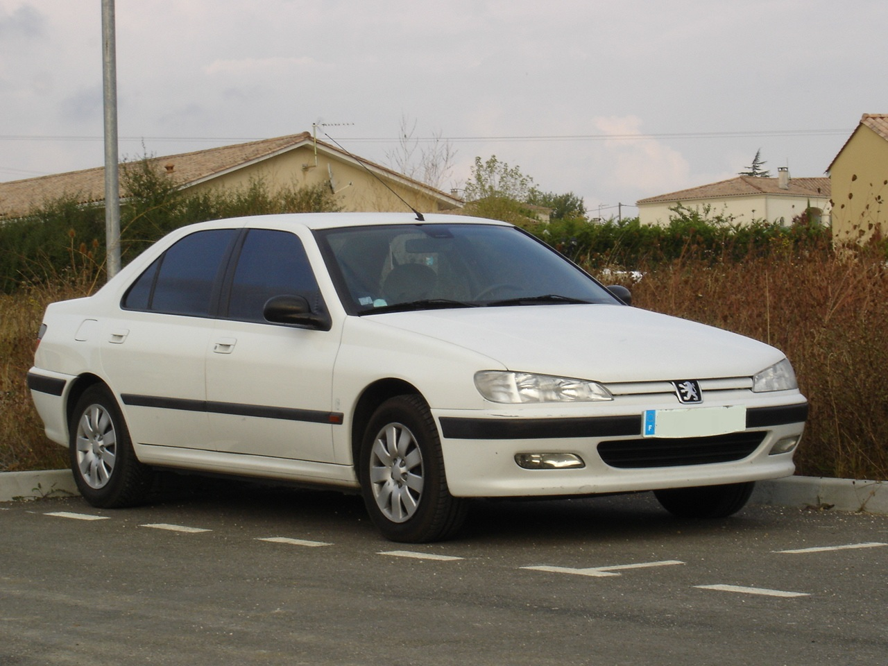 406 phase 1